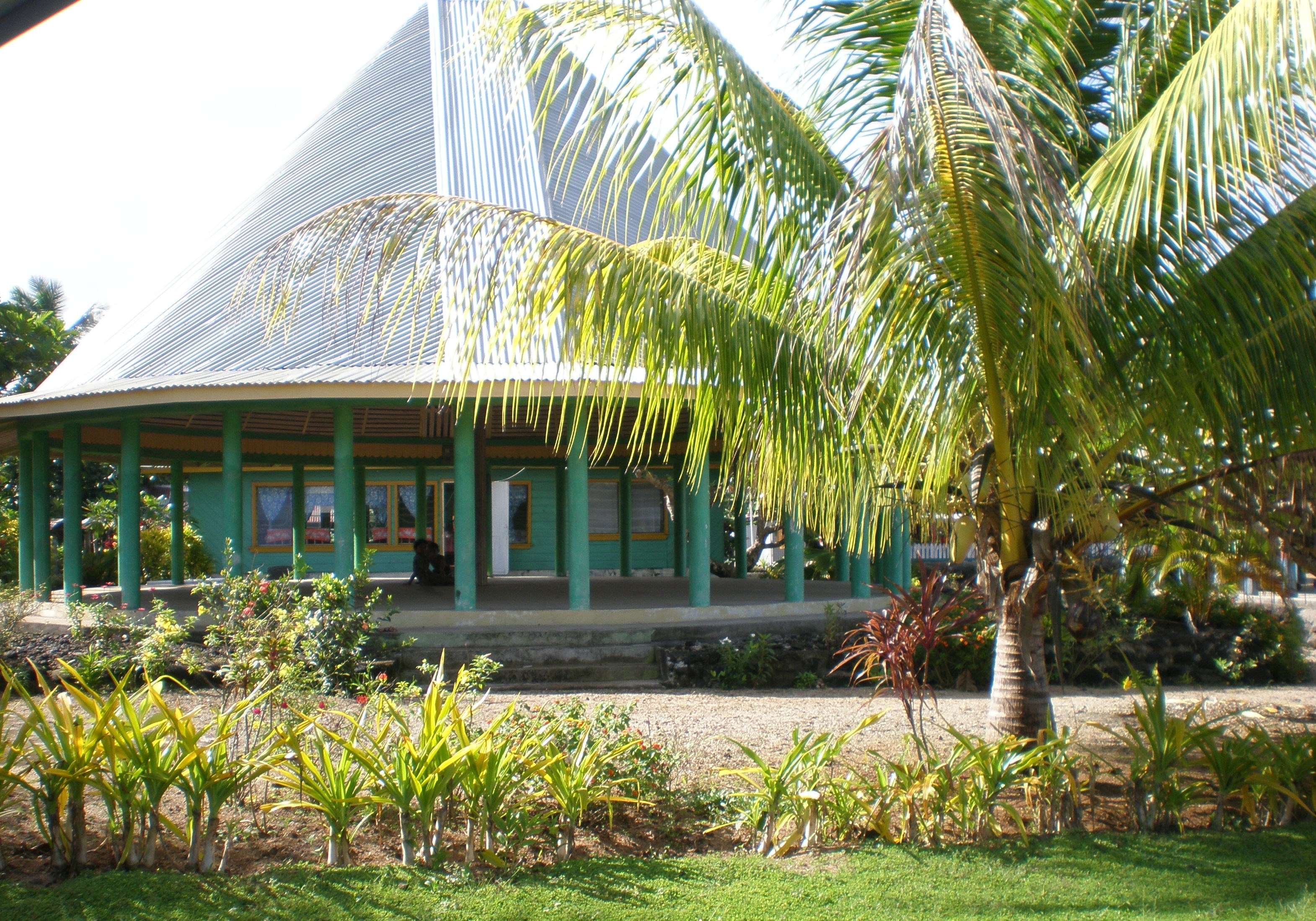 Round Samoan house (fale tele) in Avao village, Matautu village district, Savai'i island, Samoa. Gagana Samoa: Fale tele lapotopoto i le nu'u o Avao, Matautu i Savai'i.